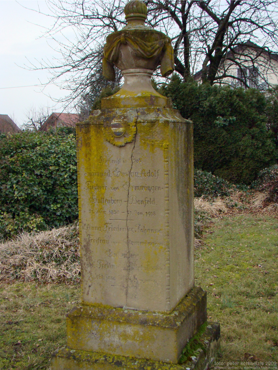 Grabmal für Freiherr Sigmund Gustav von Gemmingen-Guttenberg (1839-1918) und Gattin Anna Friederike Johanna von Gemmingen-Guttenberg geb. Freiin von Edelsheim (1852-1926) auf dem Friedhof in Bad Rappenau-Bonfeld